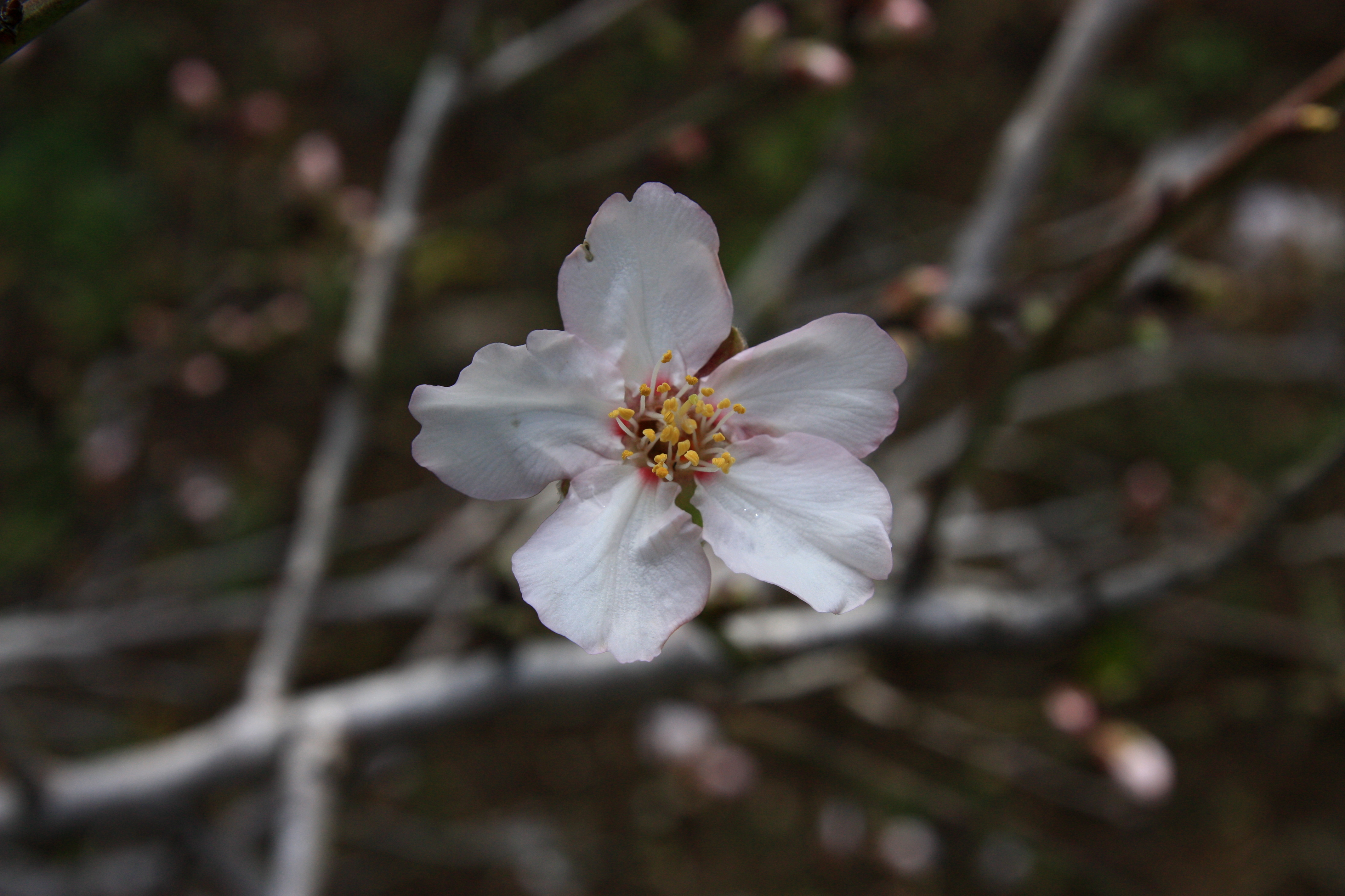 חורשת המייסדים - גבעת השבשבת, נוה שאנן חיפה enI Founders Grove - Pinwheel Hill Haifa